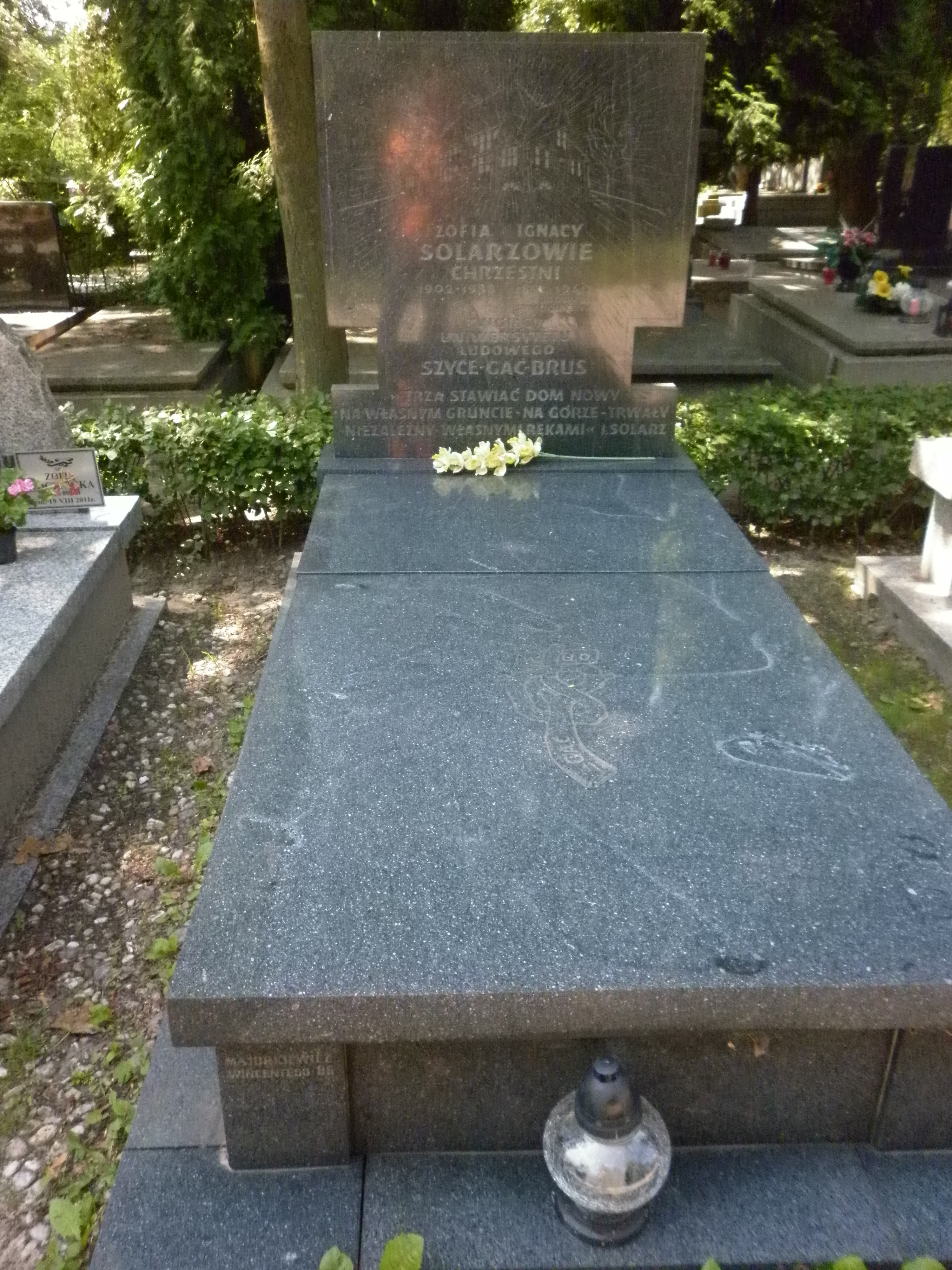 Grób Ignacego i Zofii Solarz na Wojskowych Powązkach.